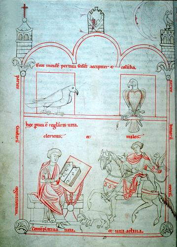 Liber Avium (c.1200), abadia de la Santa Creu, boscos de Viena. Hs 18 (226), foli 129